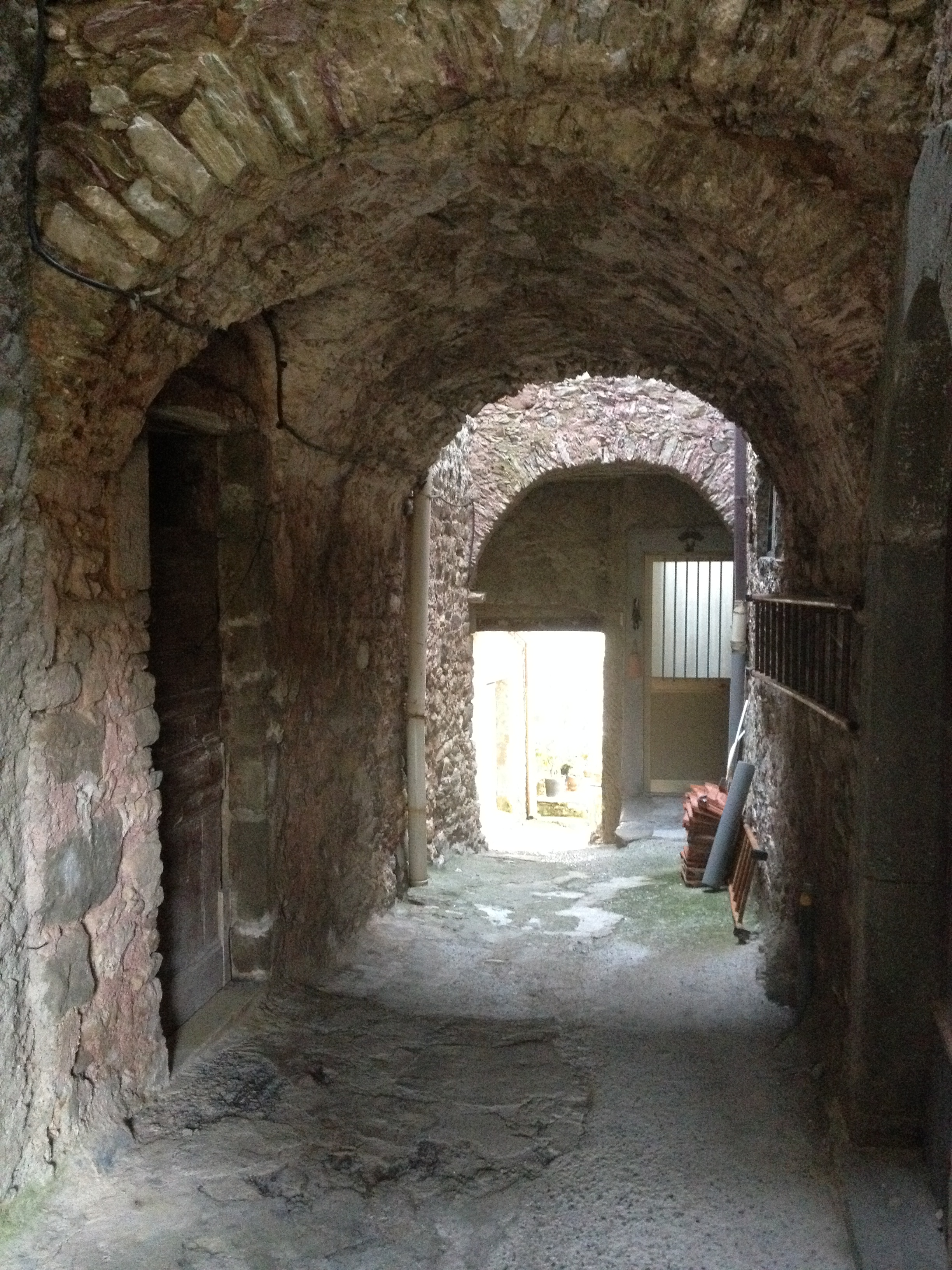 panorama view mountain